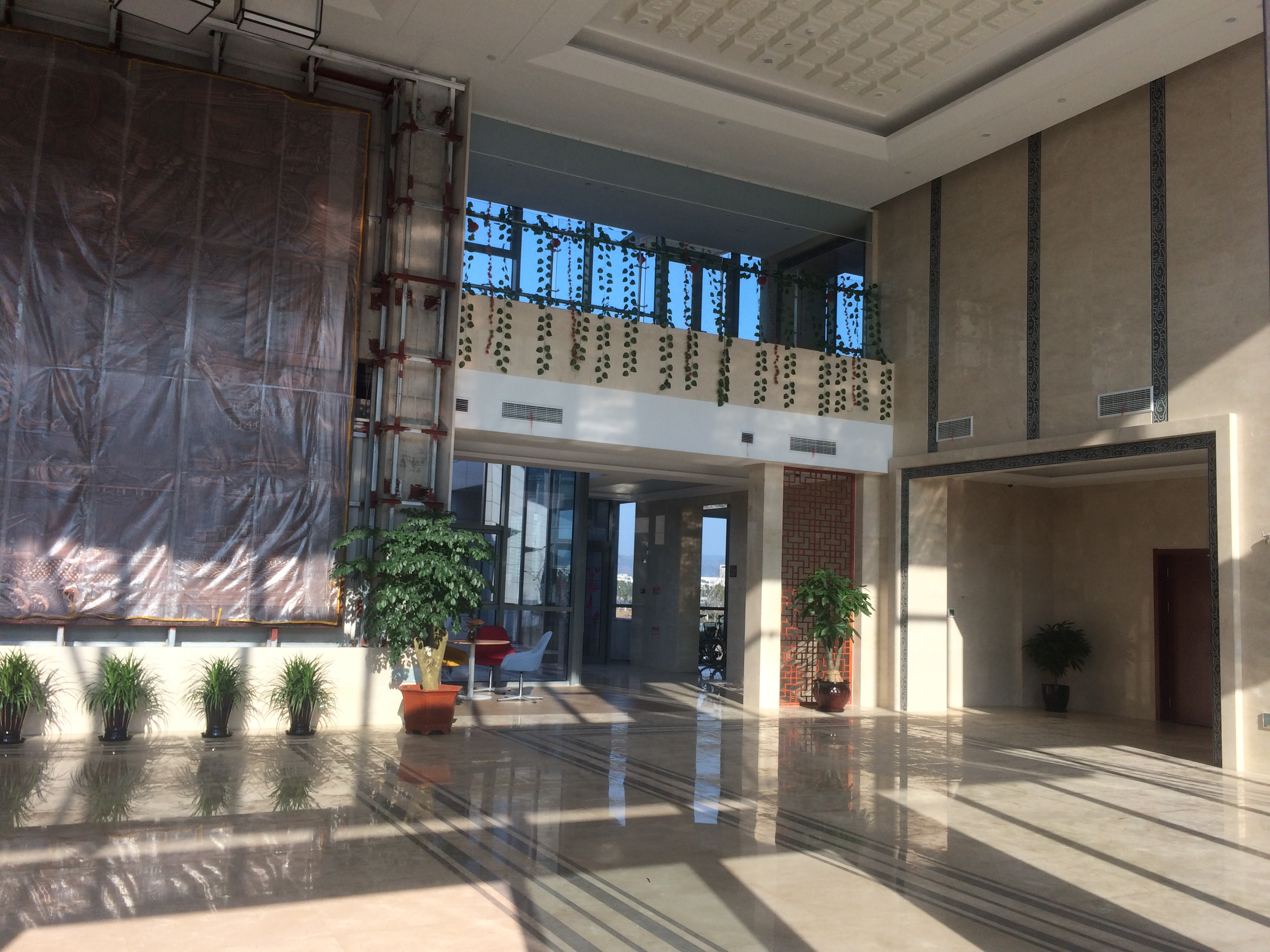 中文（中国大陆）: 玉环市档案馆